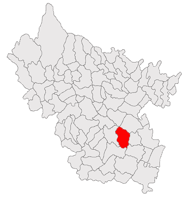 Categorie:Hărţi ale judeţului Buzău